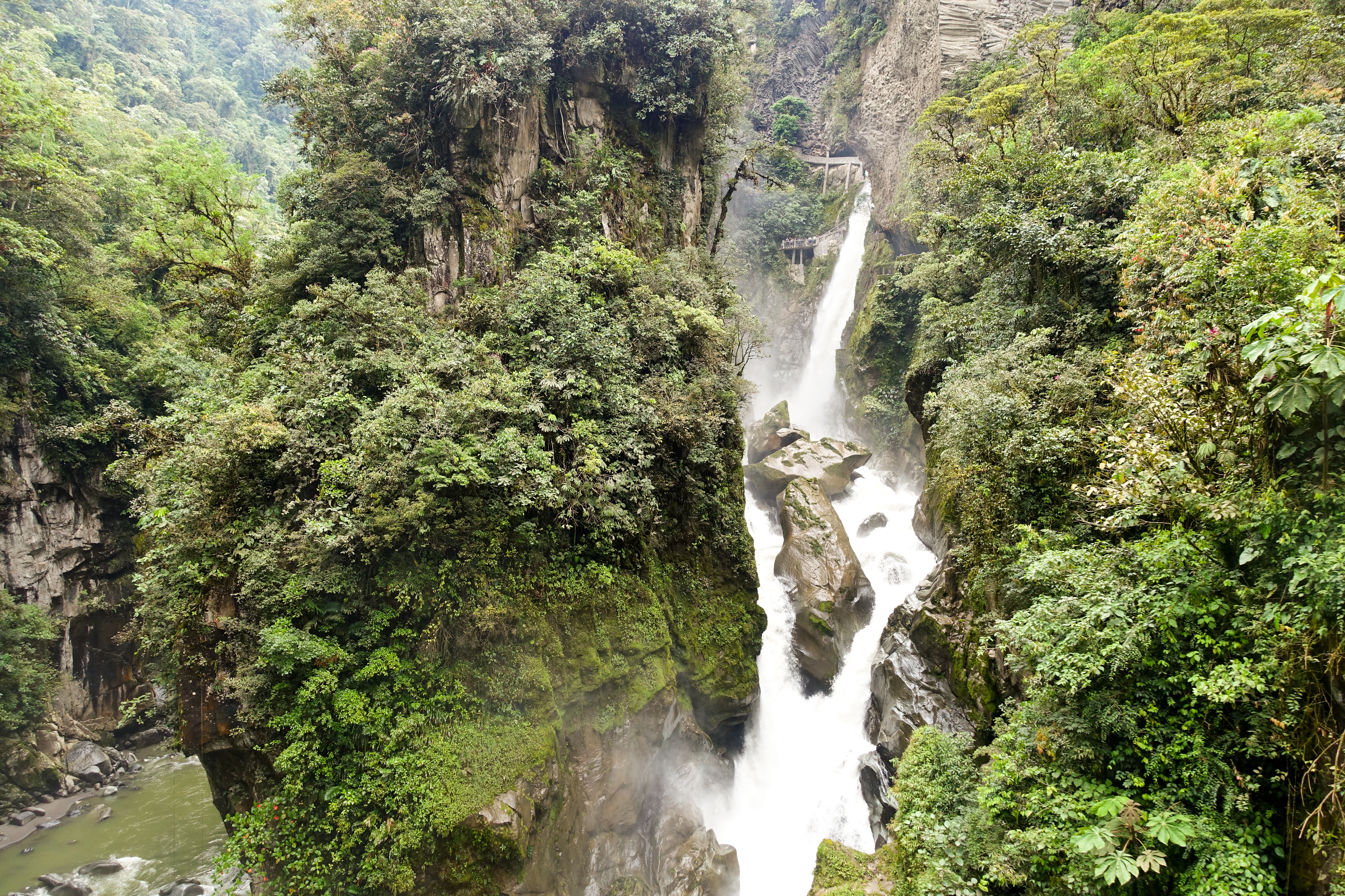 Pailón del Diablo, Río Verde, Provinz Tungurahua